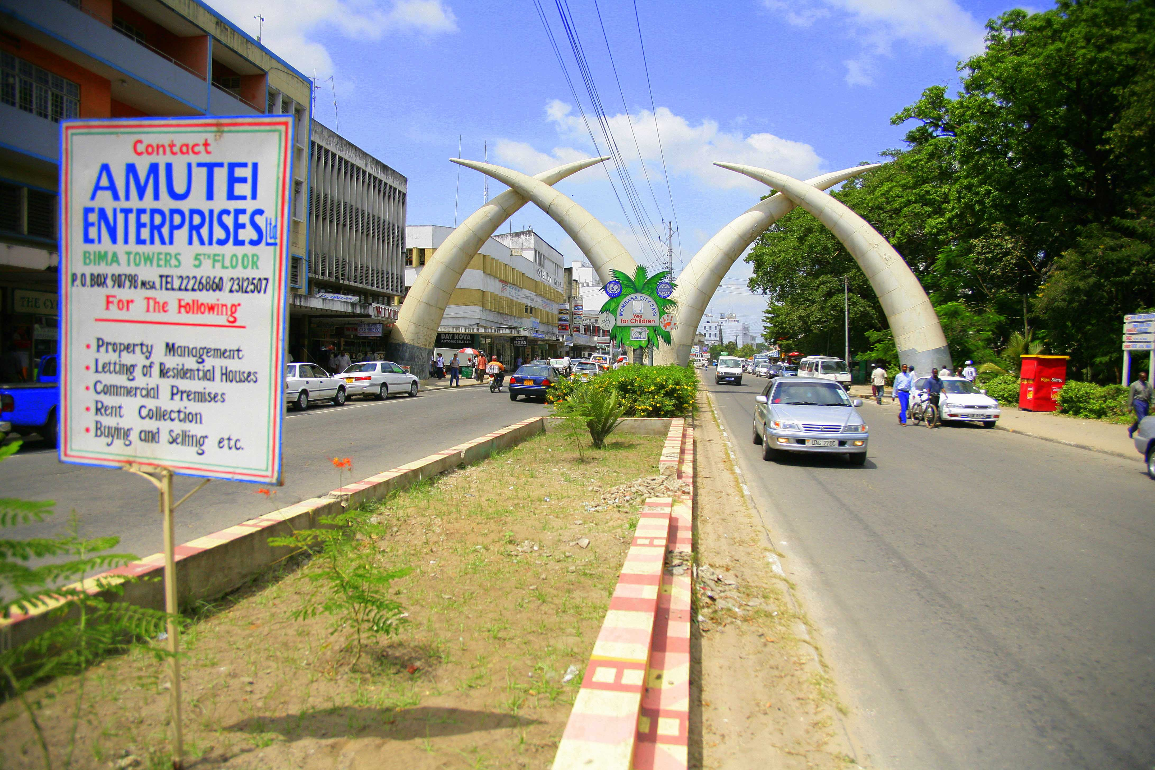 Centrum Mombasy, fot.: Cezary Piwowarski